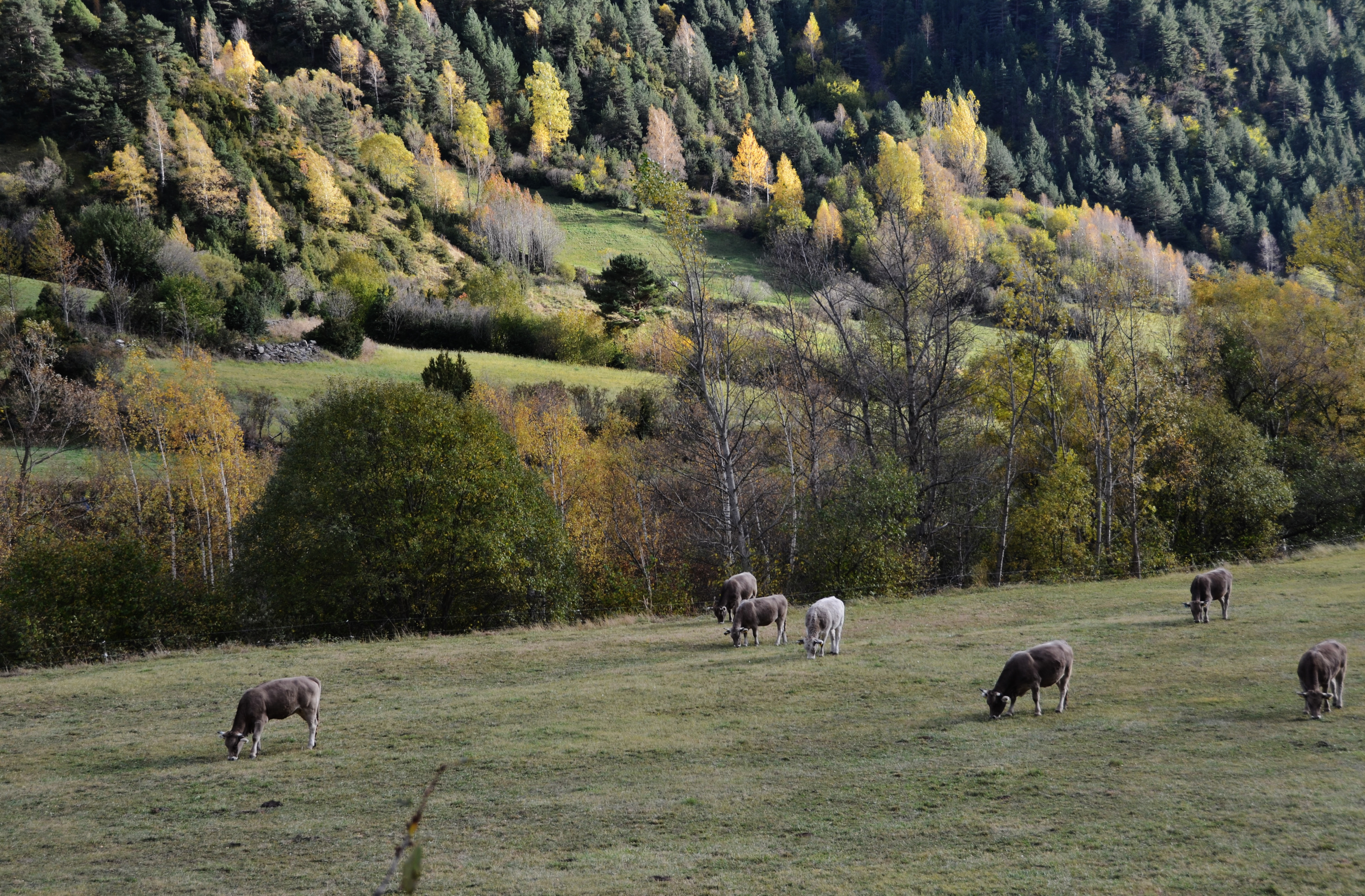 Vall de Sorteny (Ordino) This is a a photo of a natural area in Andorra with id: AD-PNVS